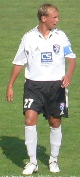 На товарищеском матче Таврия - Крымтеплица (2:1)